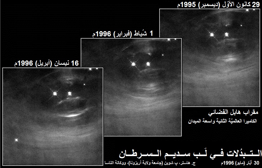 صُور مُلتقطة بواسطة مقراب هابل الفضائي تُظهر التبدُلات في حجم سديم السرطان.